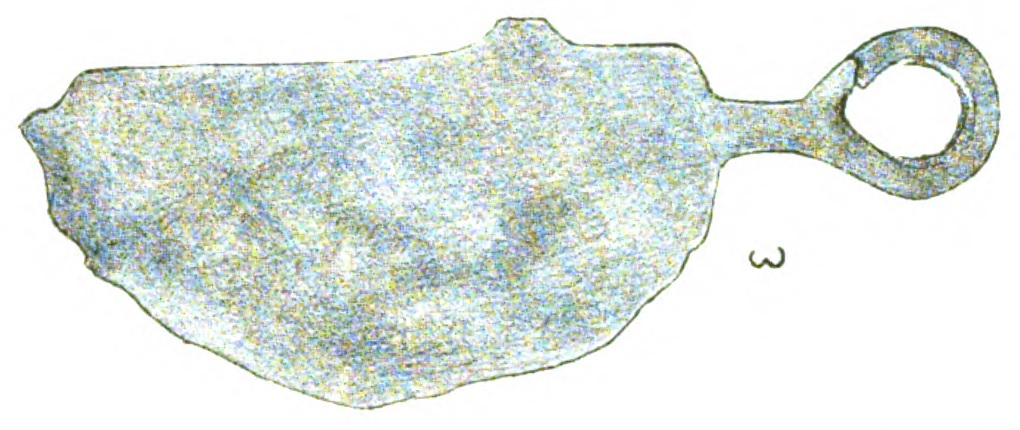 Rasoir de l'âge de bronze découvert à Plampraz (Chelin)